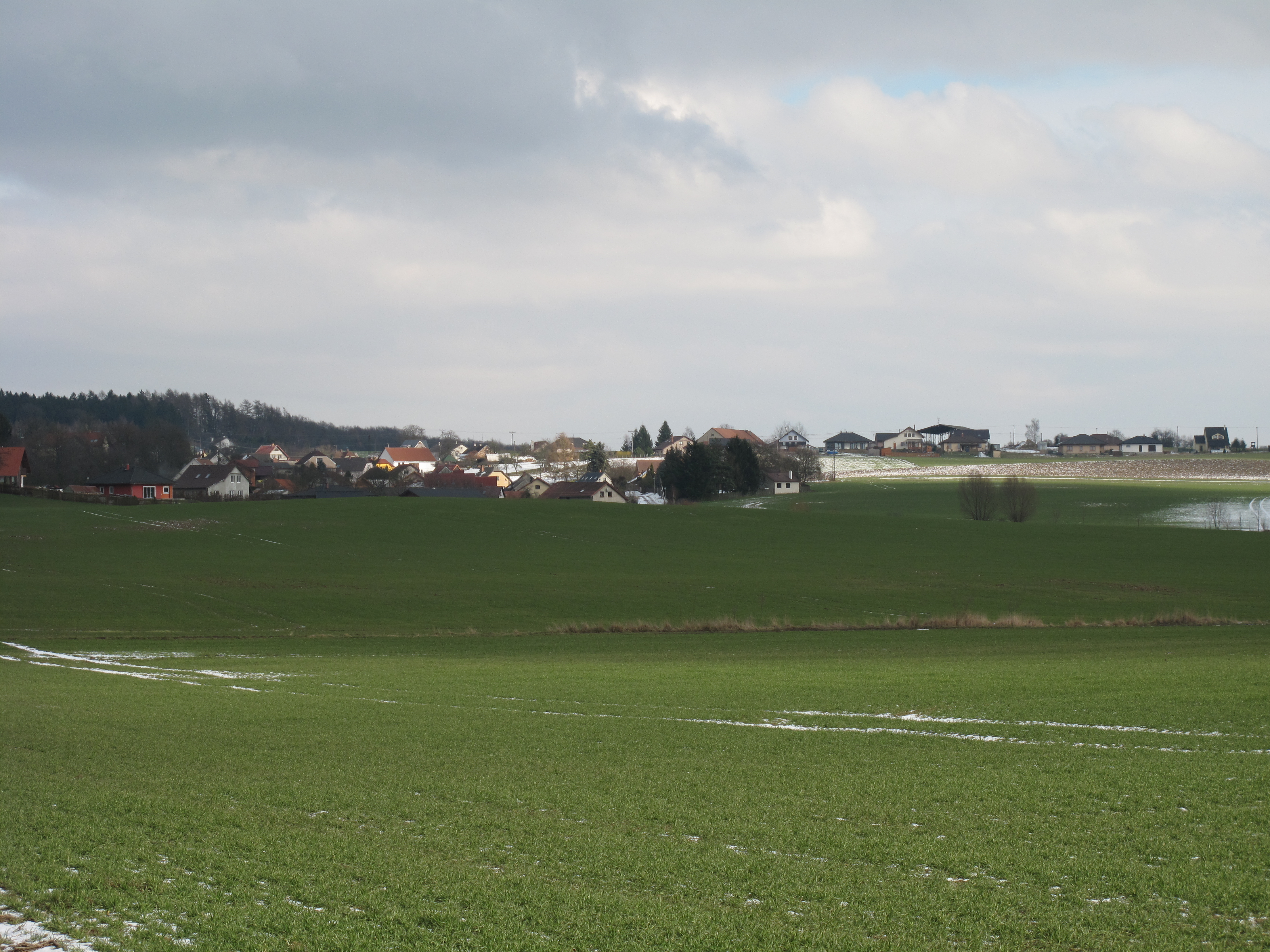 Pohled na Novou Telib. Okres Mladá Boleslav, Česká republika.